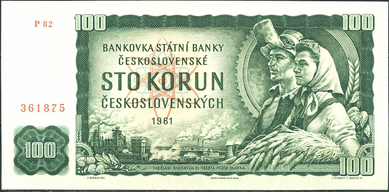 100 korun československých